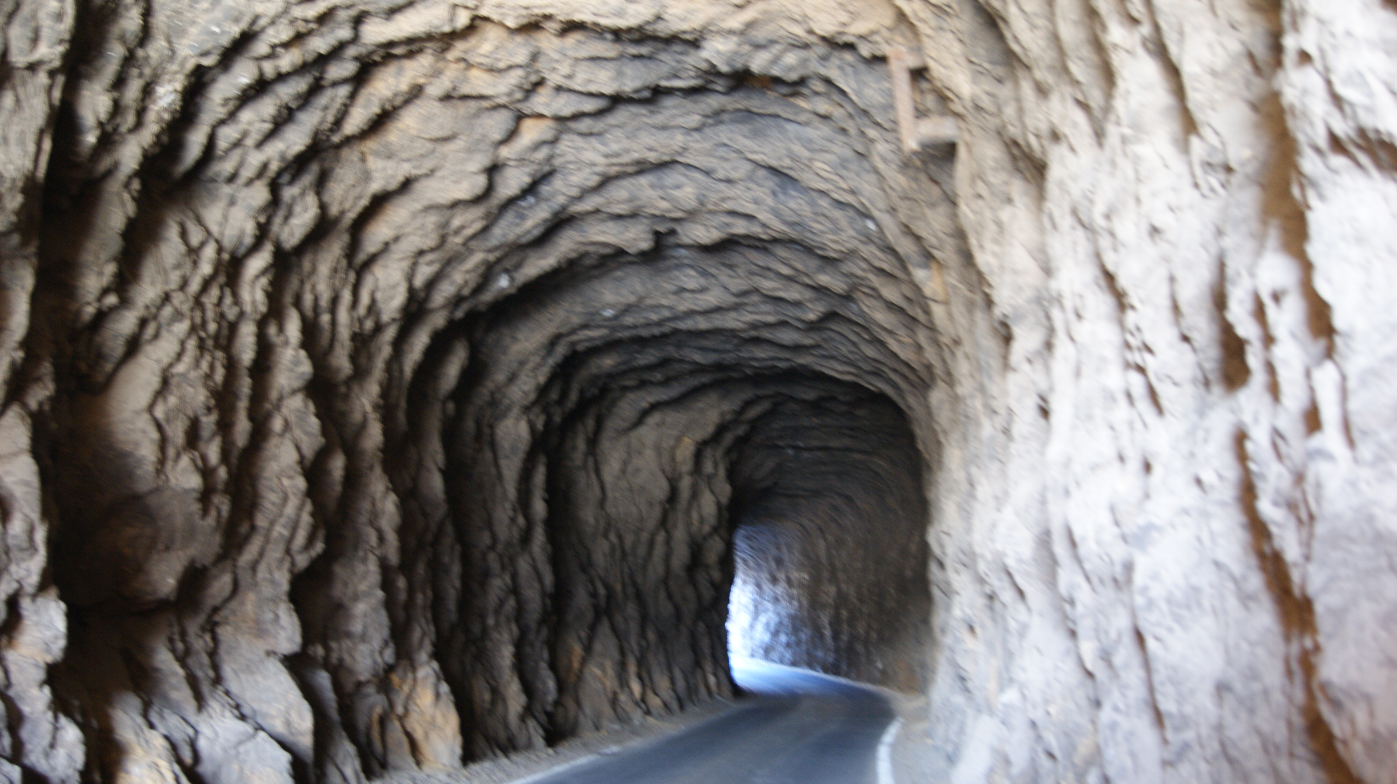 Túnel excavado en la roca del pasado ferrocarril de Lucainena